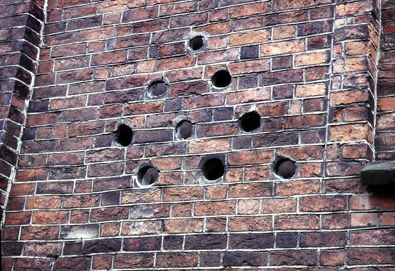 Vejle Sankt Nikolai Kirke i Danmark. Nordre korsarm, østgavl med kranier